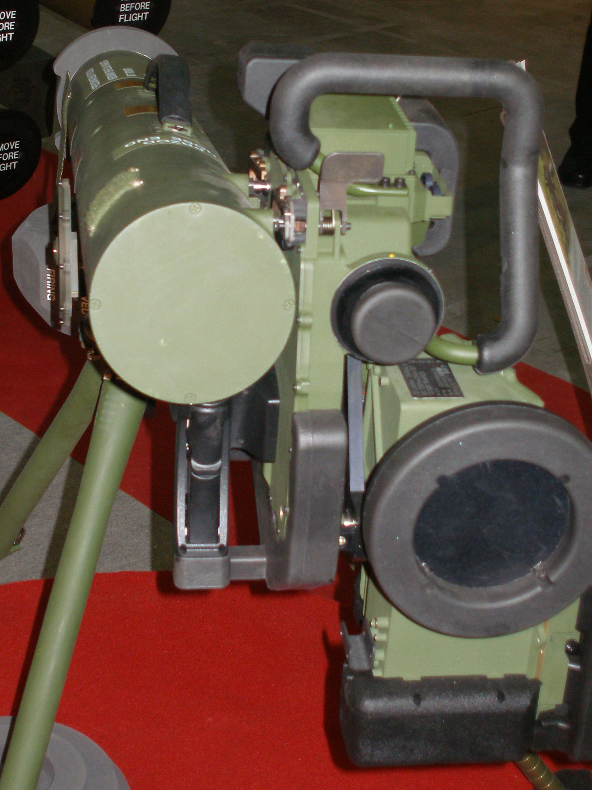 Wyrzutnia pocisków p.panc Spike.